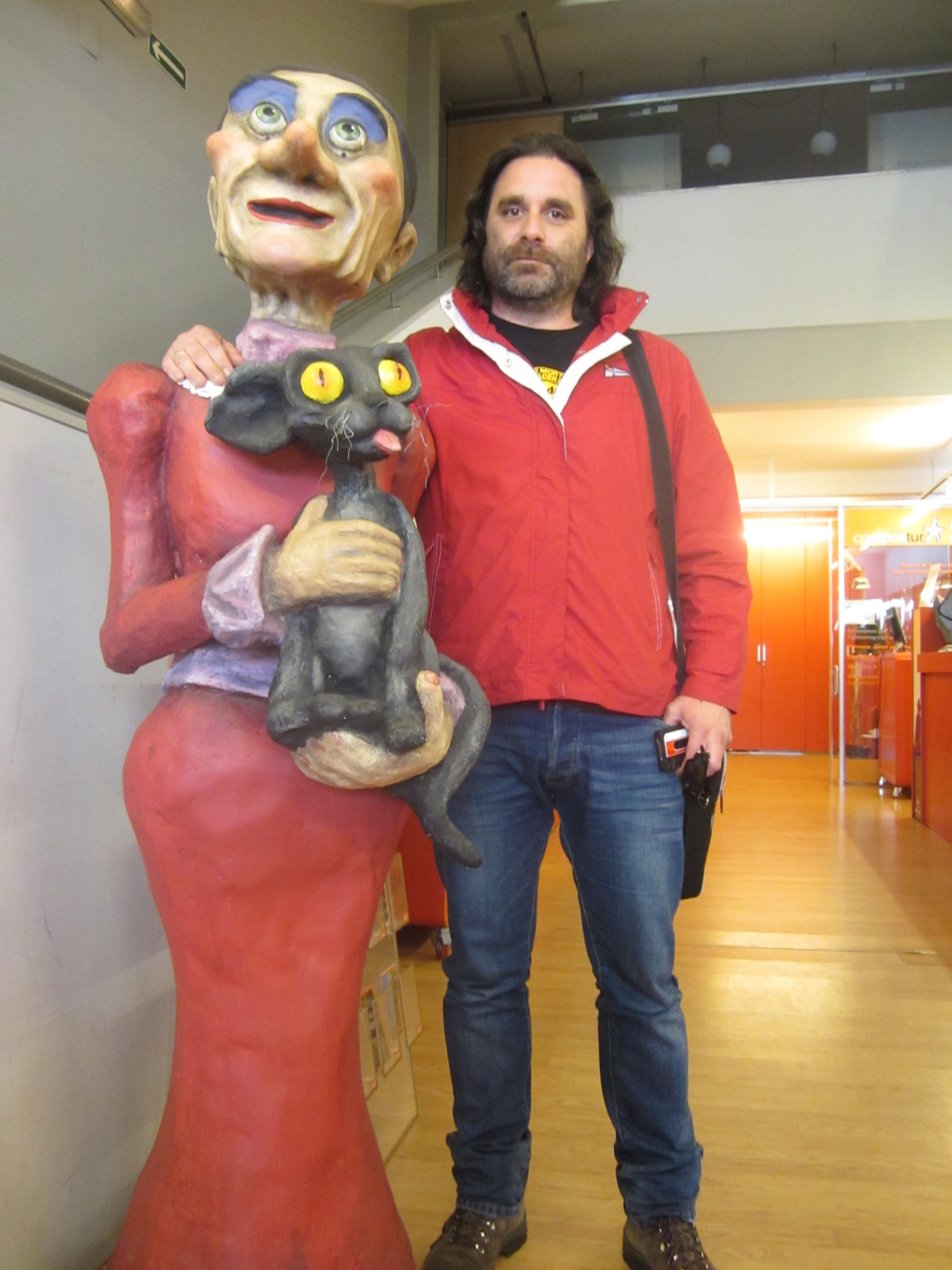 Fernando Cortizo nunha entrevista no 2012 cun personaxe da súa película "O Apóstolo".